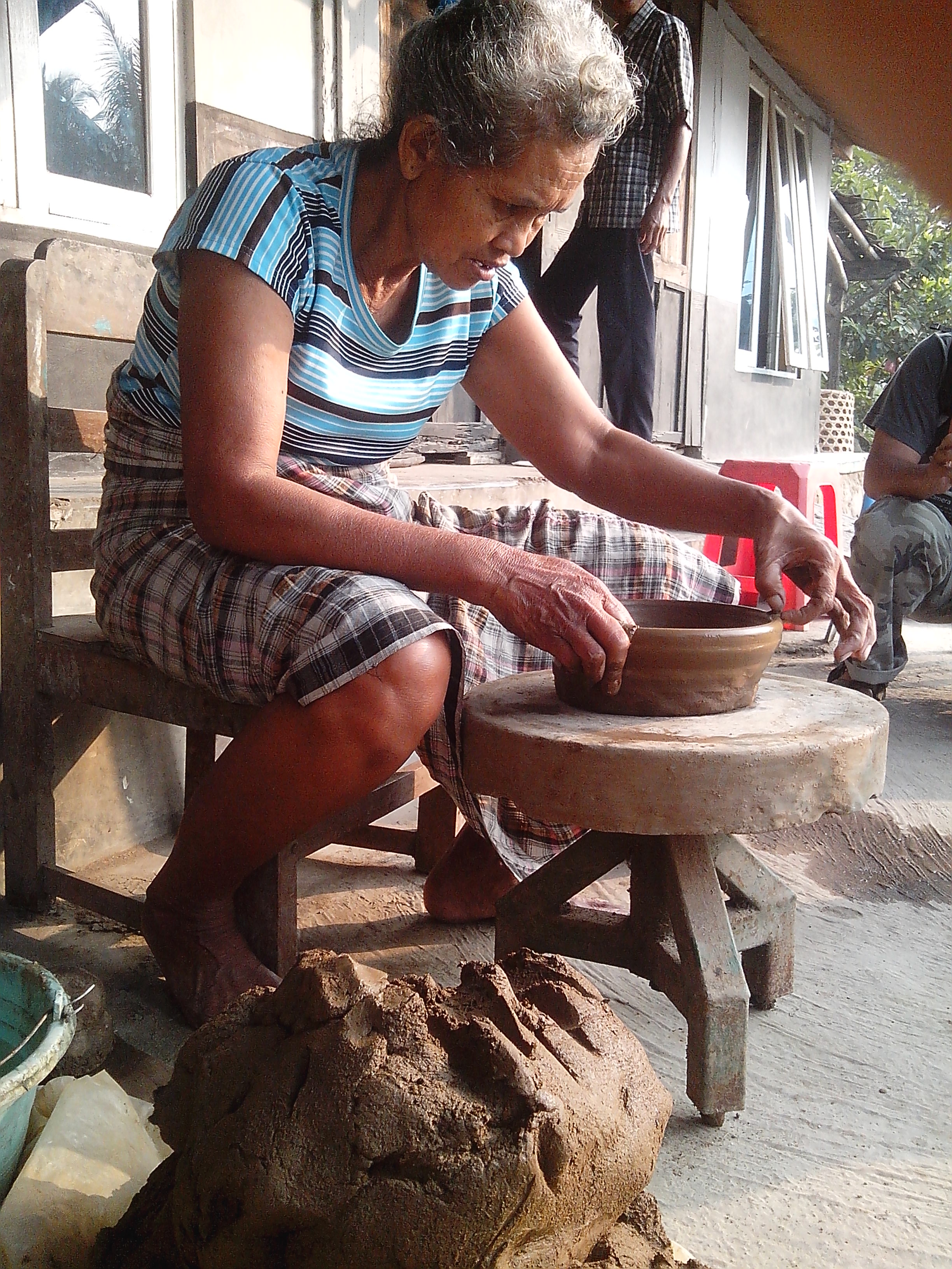 Salah satu pengrajin gerabah di Dusun Klipoh. Klipoh merupakan dusun sentra pengrajin gerabah yang telah diwariskan secara turun temurun. Klipoh berada di dekat kawasan Candi Borobudur.